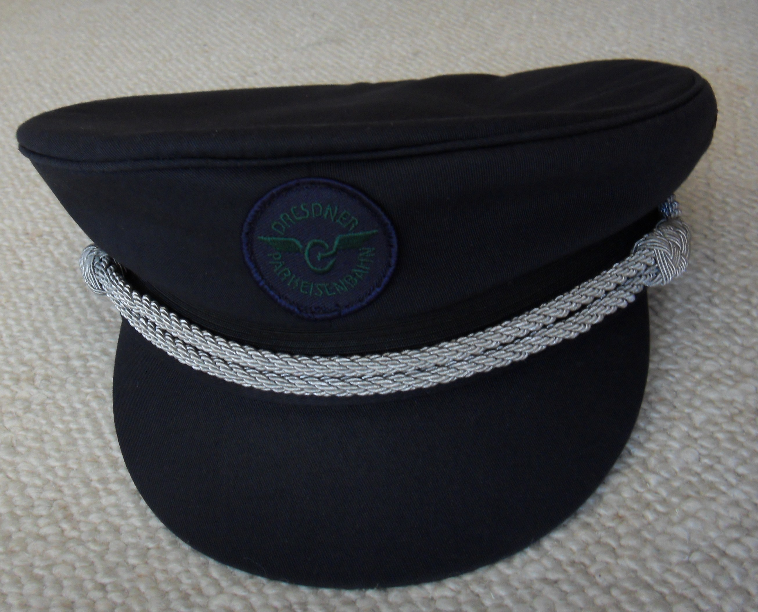 Dienstmütze eines Assistenten der Dresdner Parkeisenbahn